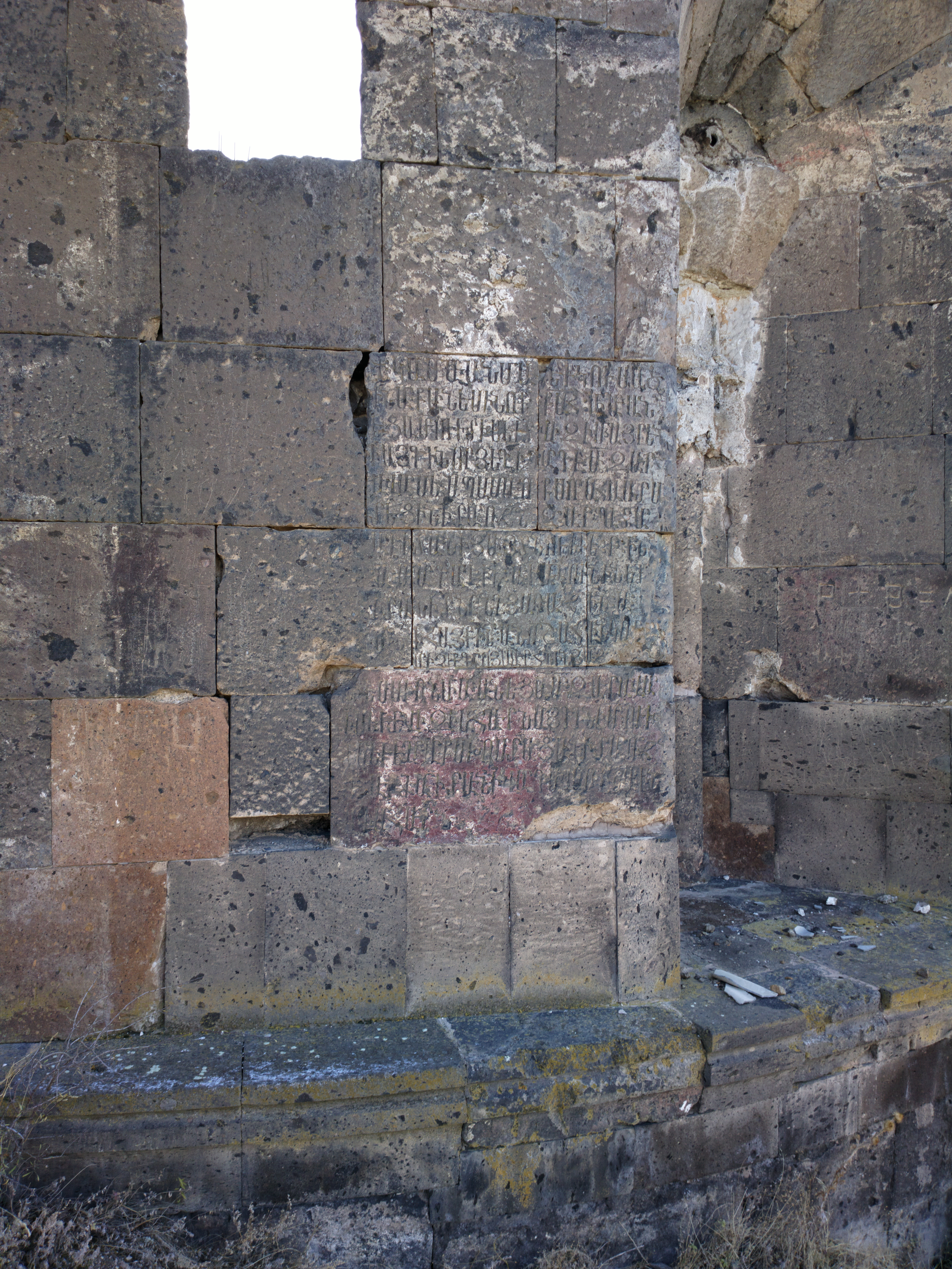 Եկեղեցի Զորավար (Սբ. Թեոդորոս, «Ղարղավանք») 31/2.1